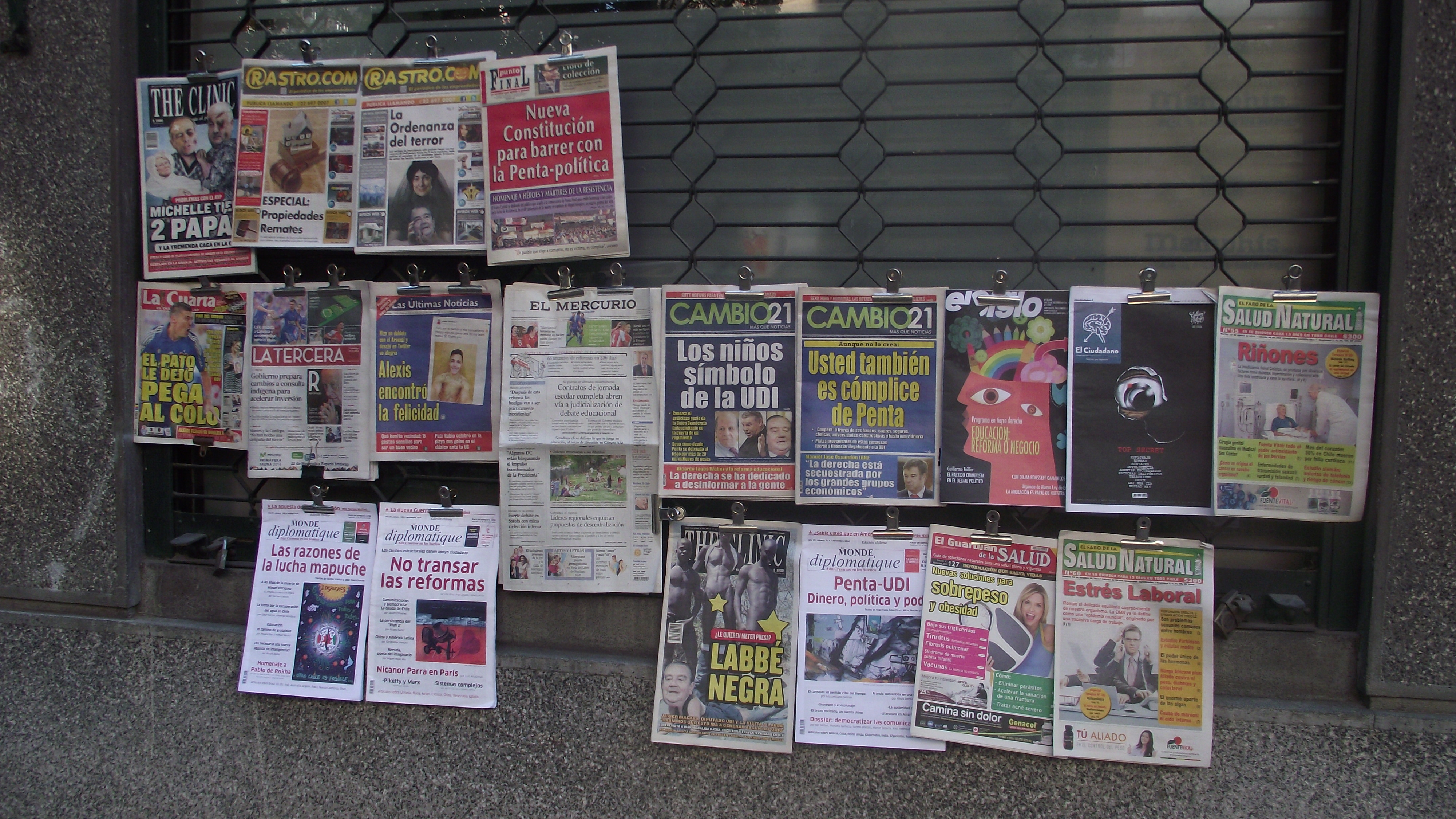 Periódicos en un quiosco ubicado en el Paseo Bulnes de Santiago de Chile.